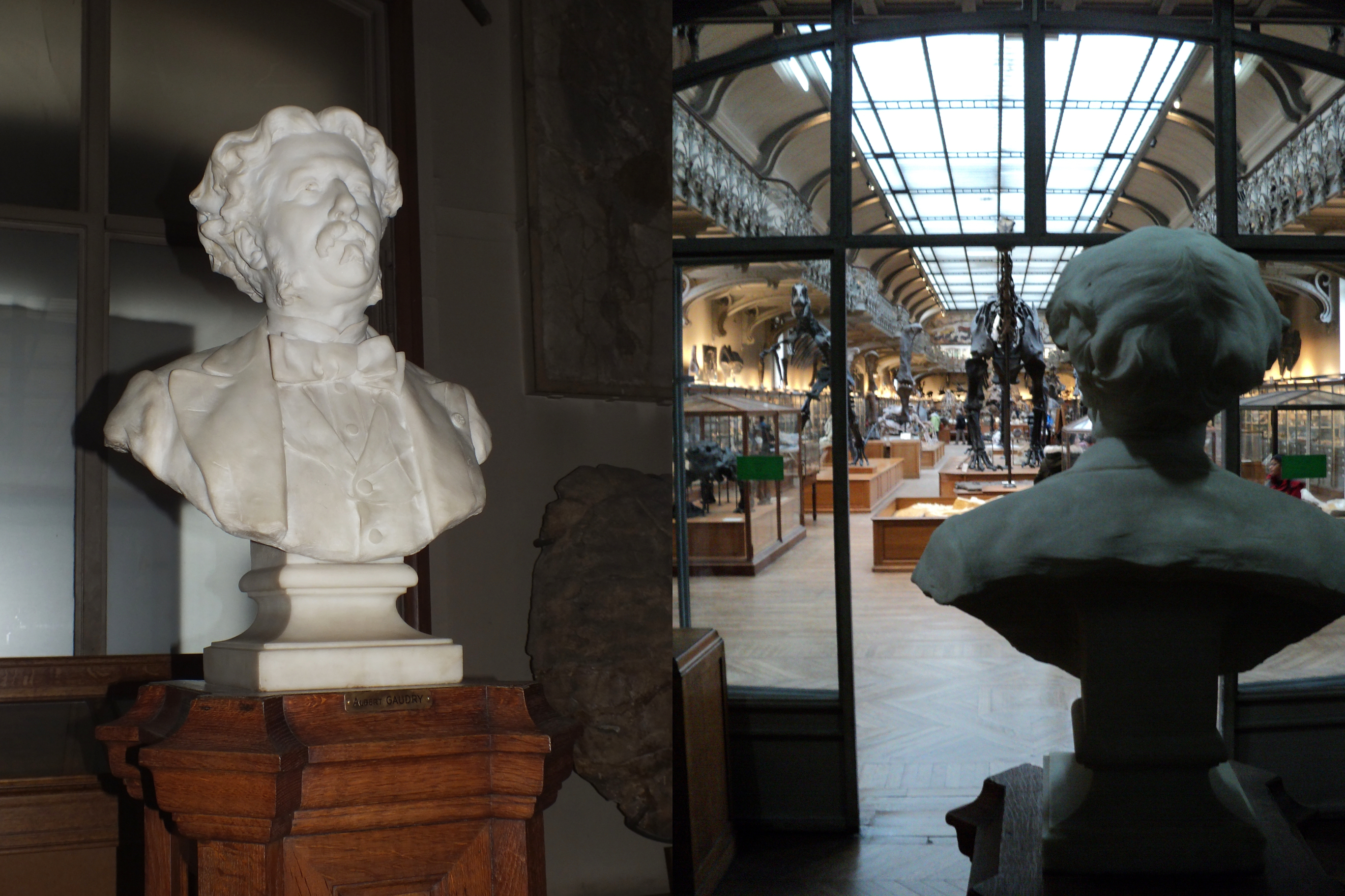 À l'entrée de la galerie de Paléontologie, buste en marbre du paléontologue français Albert Gaudry (1827-1908). Sculpté du vivant de Gaudry en 1896 par le sculpteur Louis-Ernest Barrias (1841-1905), ce buste est placé ici de la sorte que Gaudry regarde frontalement le « troupeau de l'évolution », une disposition muséologique que lui-même avait conçue. Le troupeau est constitué de squelettes de vertébrés fossiles. Tous remontent le temps en partant du fond de la Galerie, où sont situés les quadrupèdes fossiles les plus récents (mammouths, Megaloceros, etc.), et marchent ainsi vers l'entrée de la Galerie, où sont exposés quelques tétrapodes des ères Paléozoïque et Mésozoïque. C'est donc au début de la visite que de grands dinosaures du Mésozoïque comme Allosaurus ou Diplodocus se retrouvent quasiment face à face avec Albert Gaudry… mais aussi avec le visiteur ébahi.